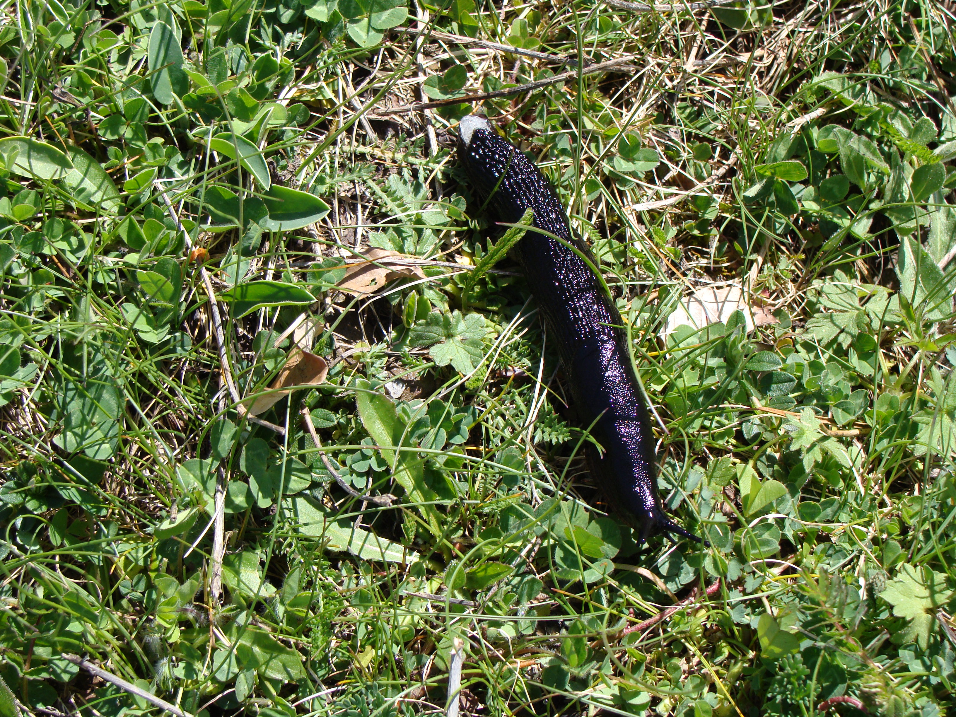 Cirque de Gavarnie - faune - Limace